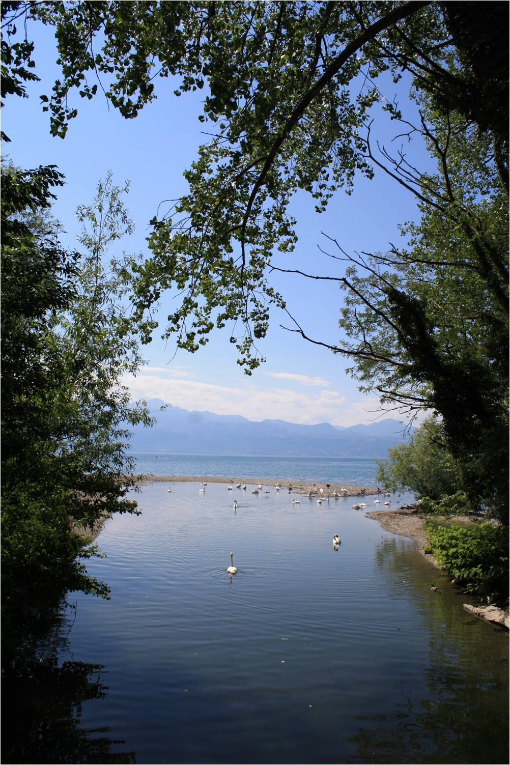 Embouchure de la Chamberonne.